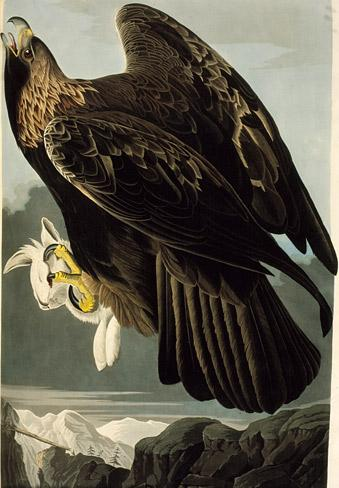 Golden Eagle (Aquila chrysaetos)